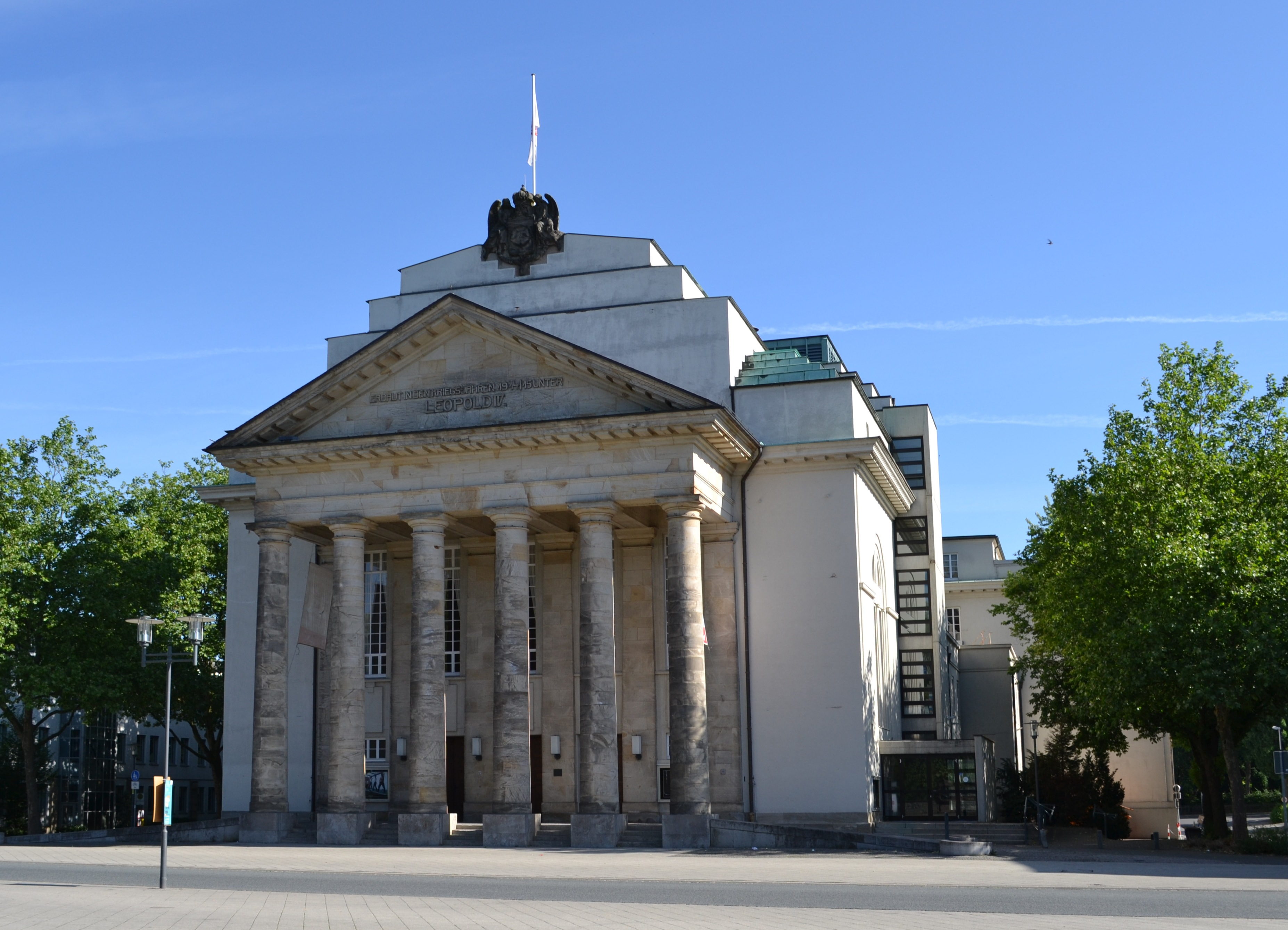 Baudenkmal Detmold Nr. 94 - Landestheater Detmold Theaterplatz 1